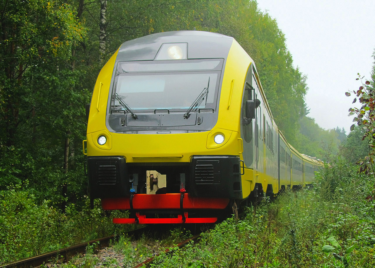 Дизель-поезд ДПМ-001 на перегоне Карасёво-Озёры